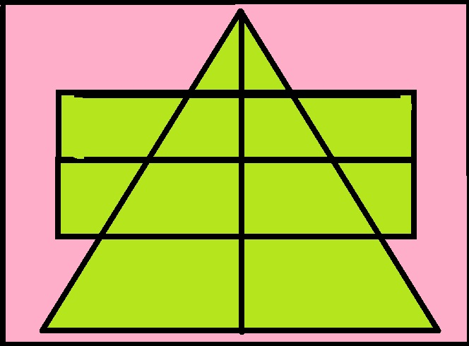 2 వ రకం- పులిజూదం